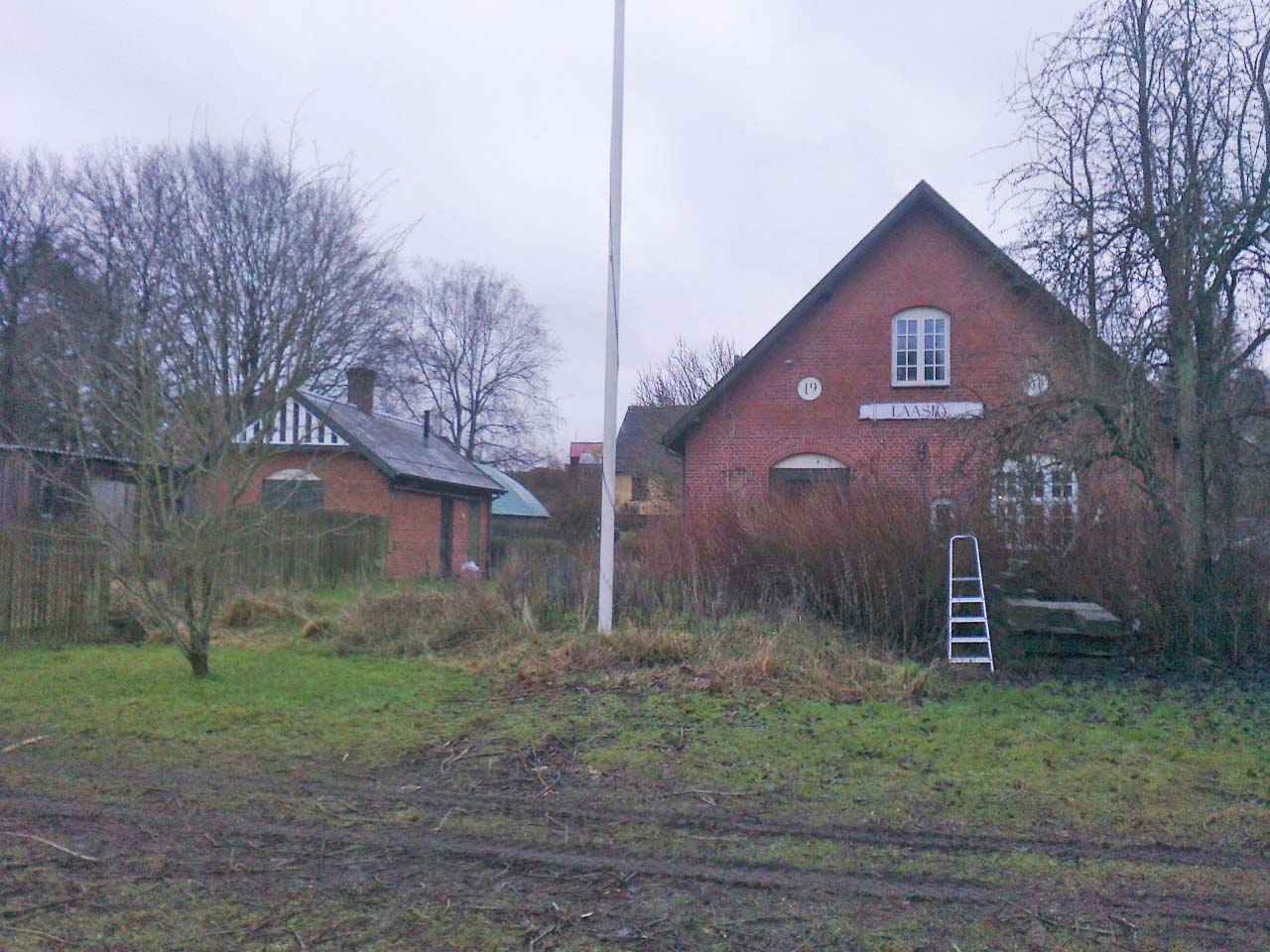 Laasby station på den nedlagte Hammelbane